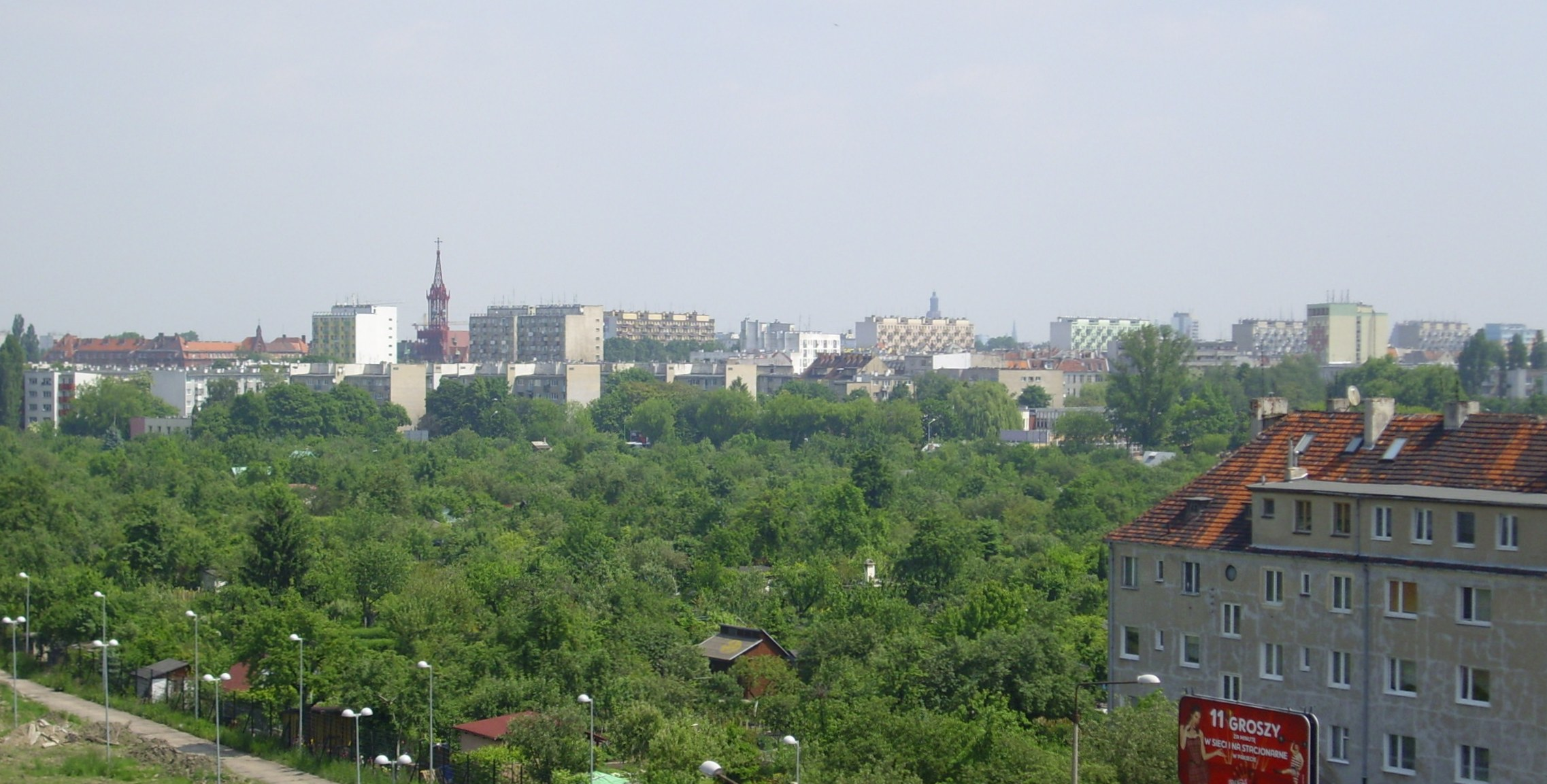 Wrocław. Gajowice.